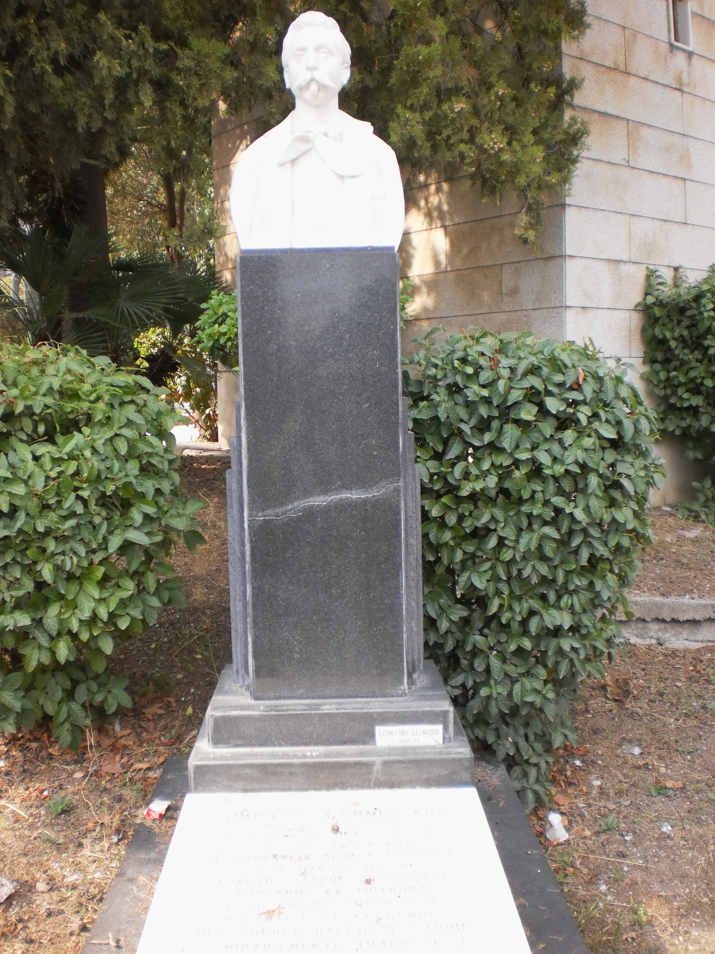 Tomba di Tommaso Cannizzaro